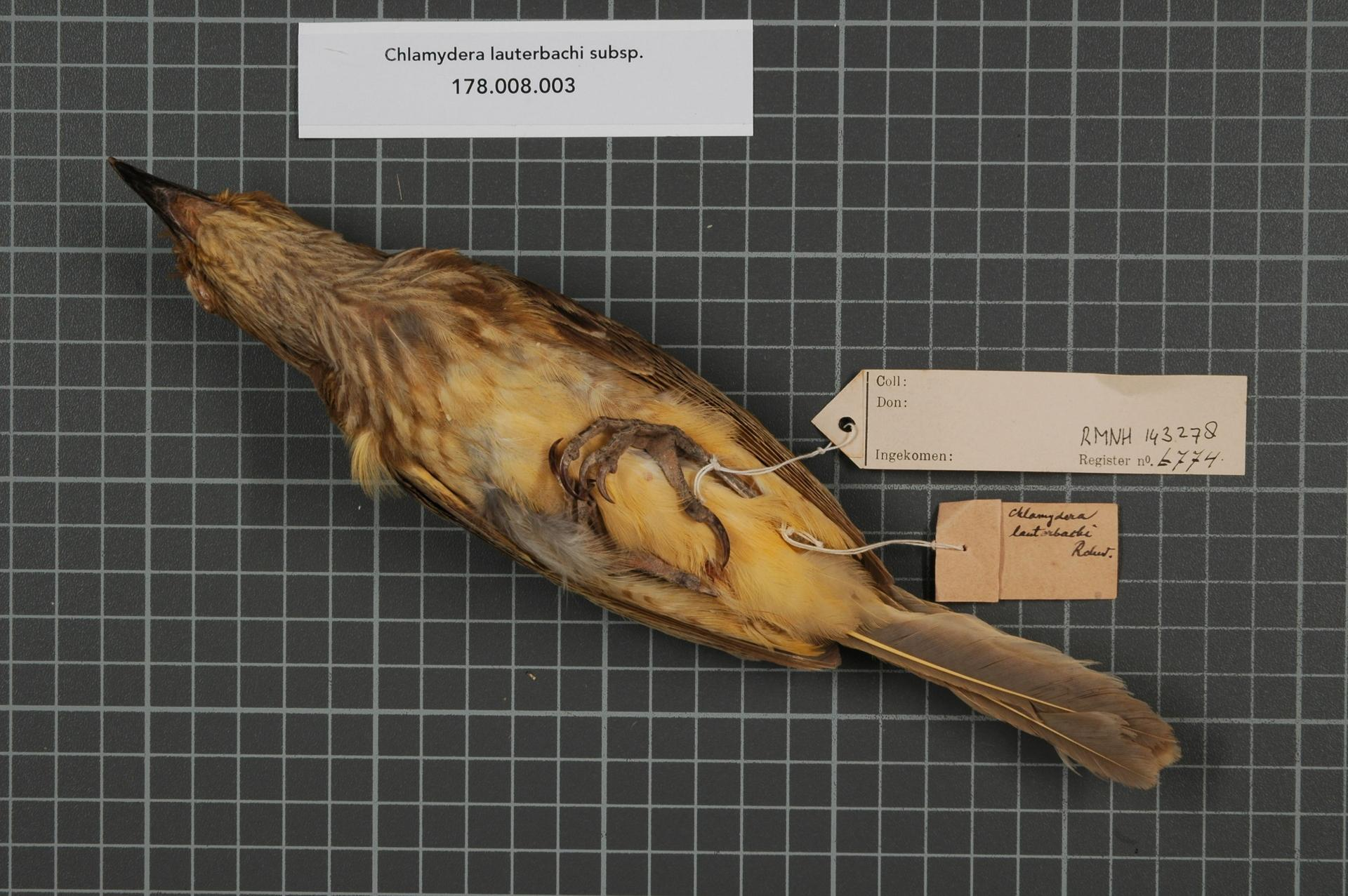 Chlamydera lauterbachi subsp.